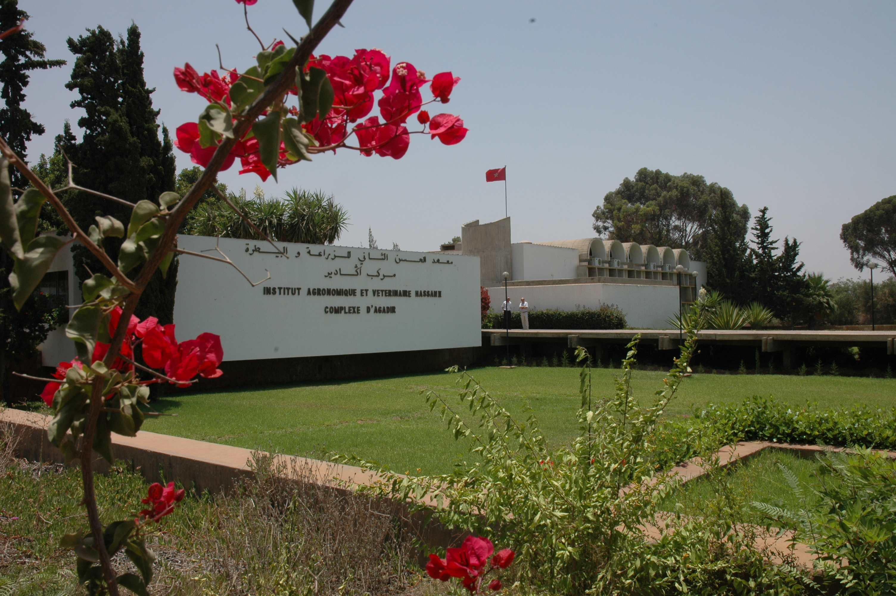 Complexe horticole d'Agadir de l'IAV Hassan II